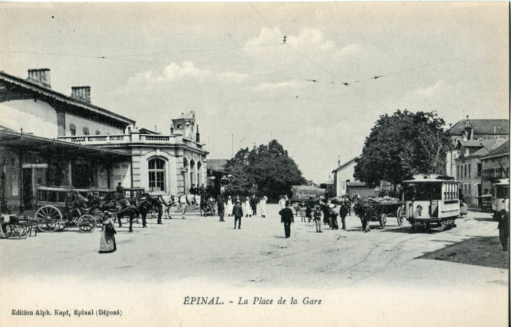 Carte postale ancienne éditée par Alph. Kopf à Épinal : ÉPINAL - La Place de la Gare